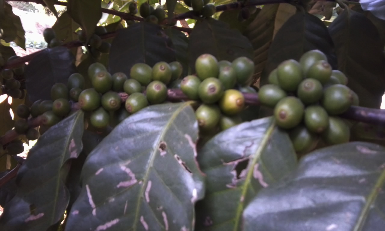 नेपाली: फलेको कफी